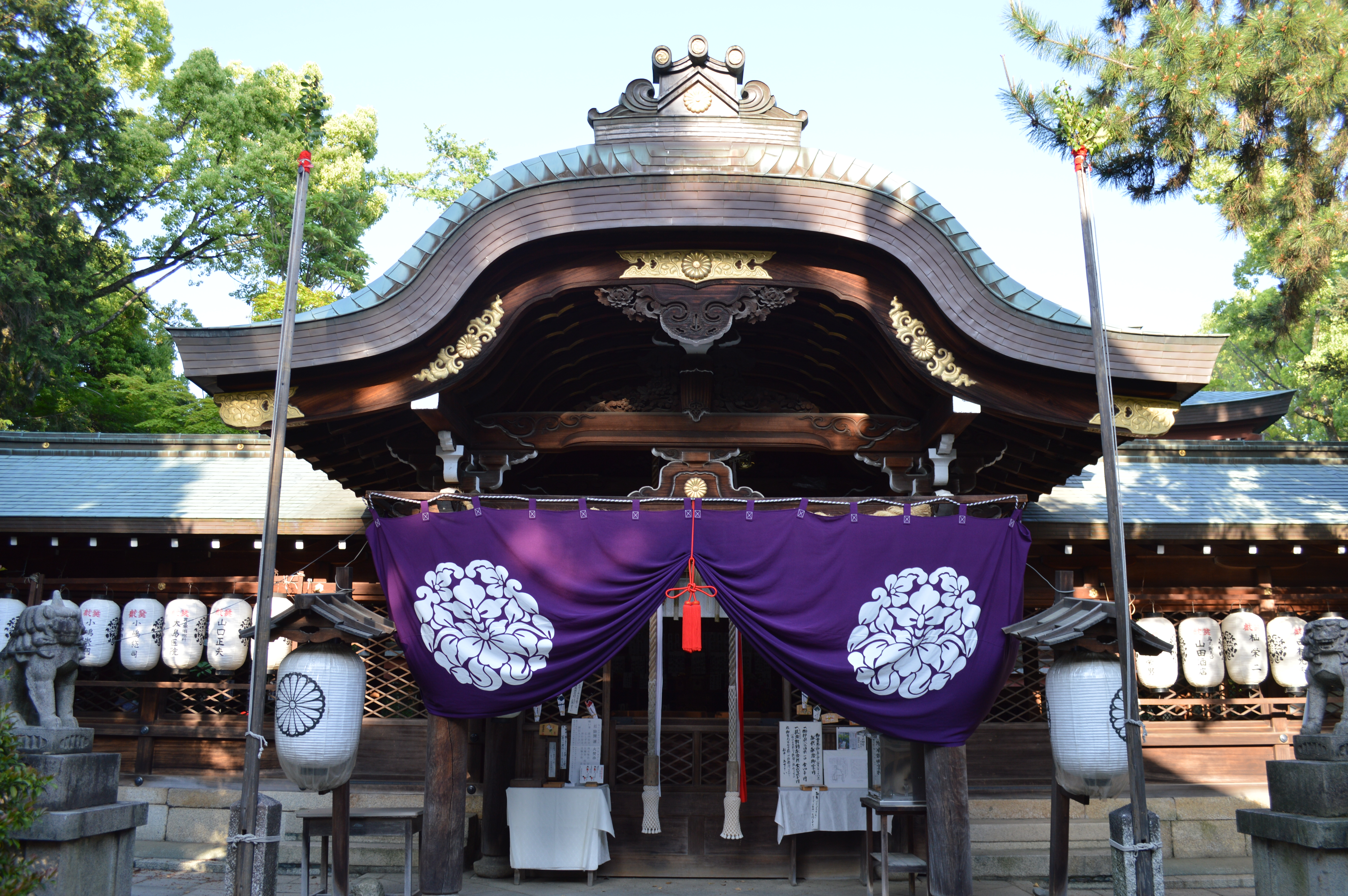 京都府京都市上京区上御霊竪町 上御霊神社 本殿 2014年の還幸祭の2日前に撮影したため、紫色の神社幕が掛けられている。